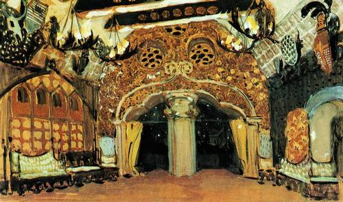 Эскиз декорации к балету П.И. Чайковского "Лебединое озеро". 1901 Эскиз Государственный центральный театральный музей им. А.А.Бахрушина